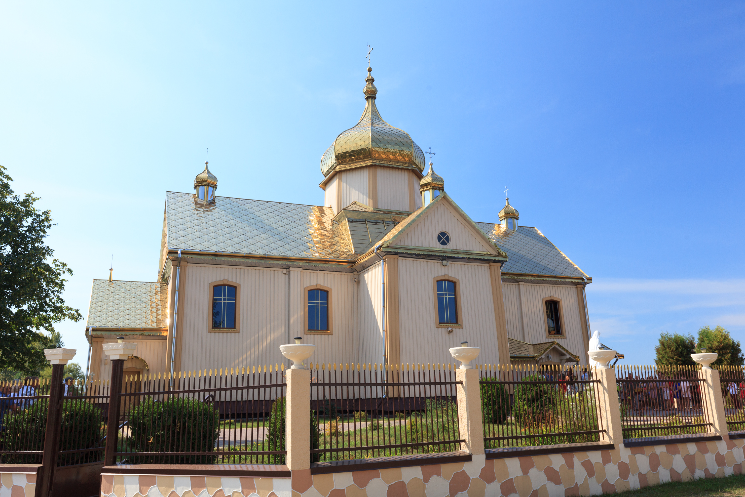 Церква Успення Пресвятої Богородиці, с.Наконечне Перше